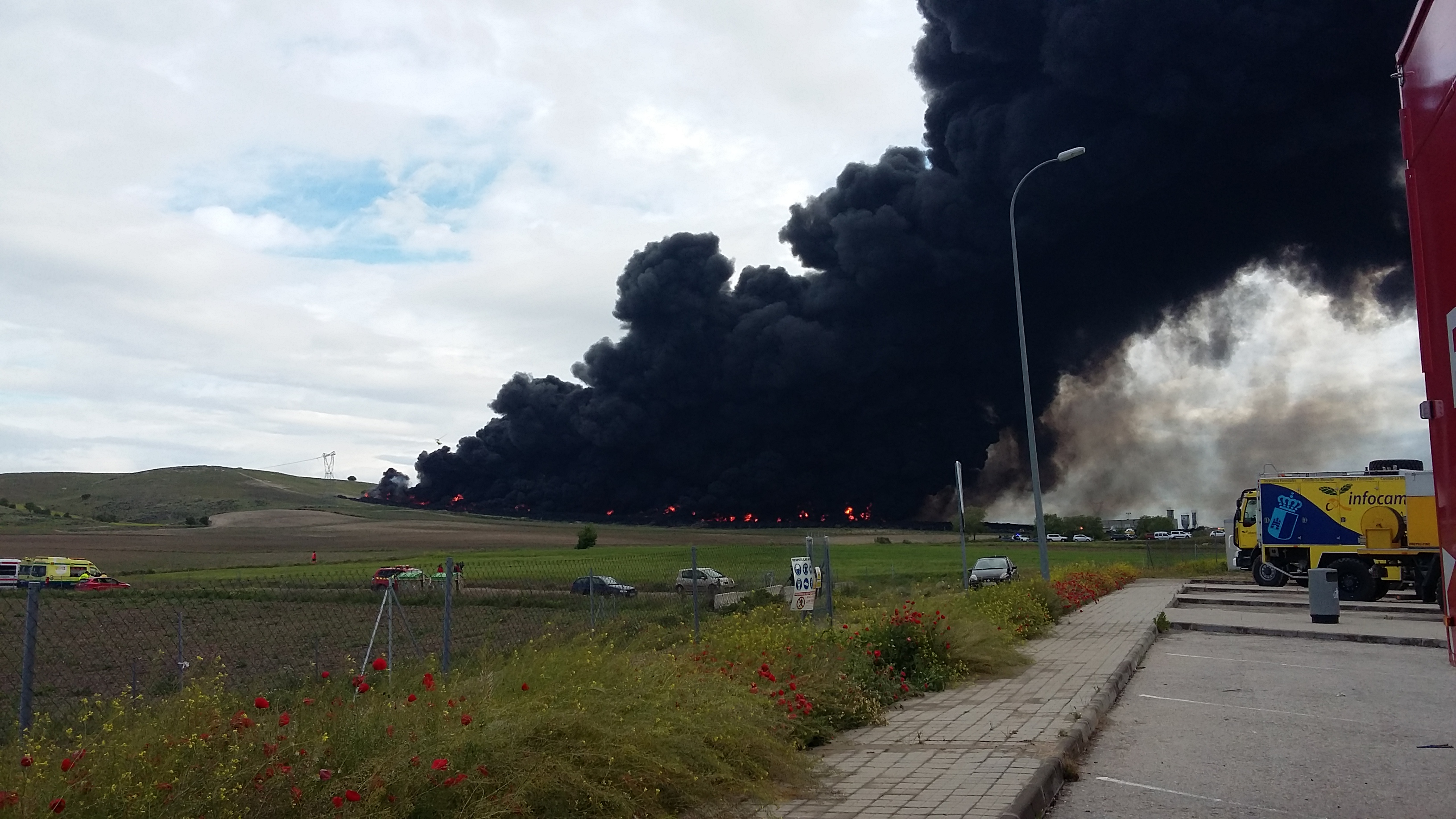 Toledo, 13/05/2016. El presidente de Castilla La Mancha, Emiliano García-Page, se encuentra en Seseña atendiendo al incendio originado esta madrugada. (Fotos: Ignacio López//JCCM)